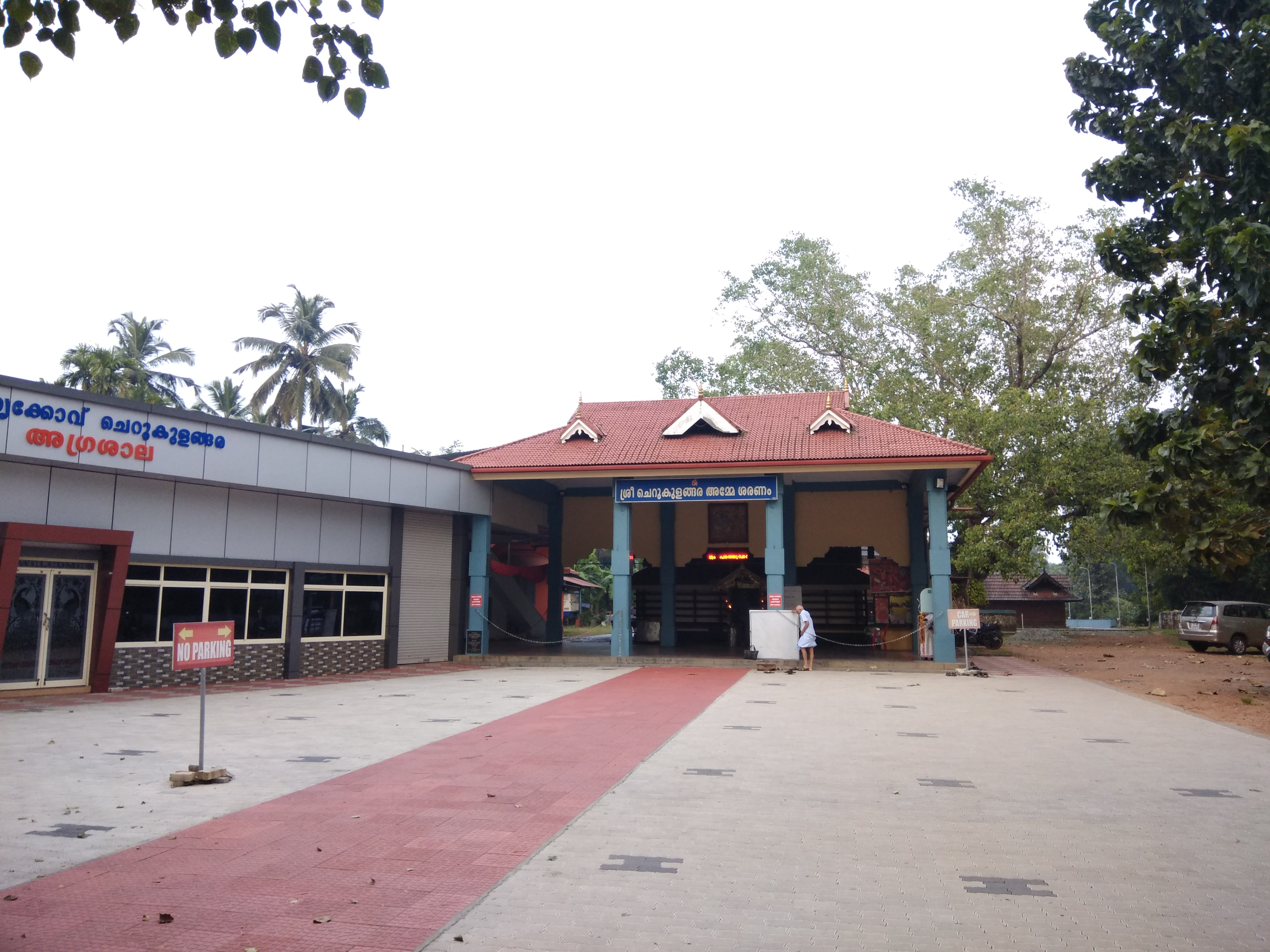 chreukulangara bhagavathi temple ollukkara mannuthy thrissur kerala